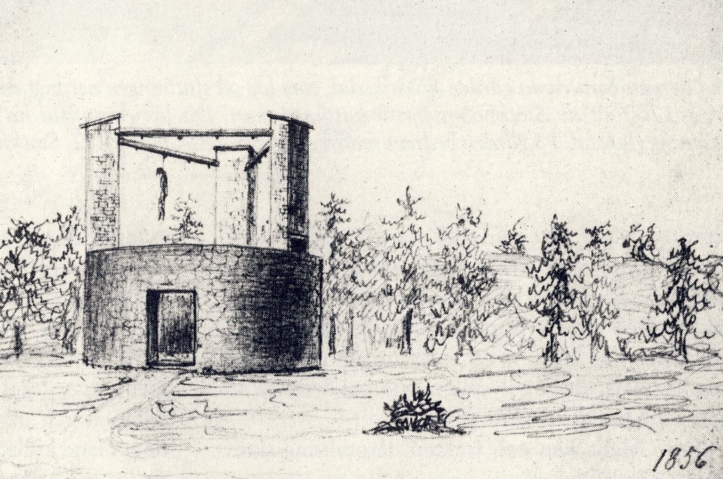 Galgbacken på Hammarby, södra Stockholm, skiss från 1856